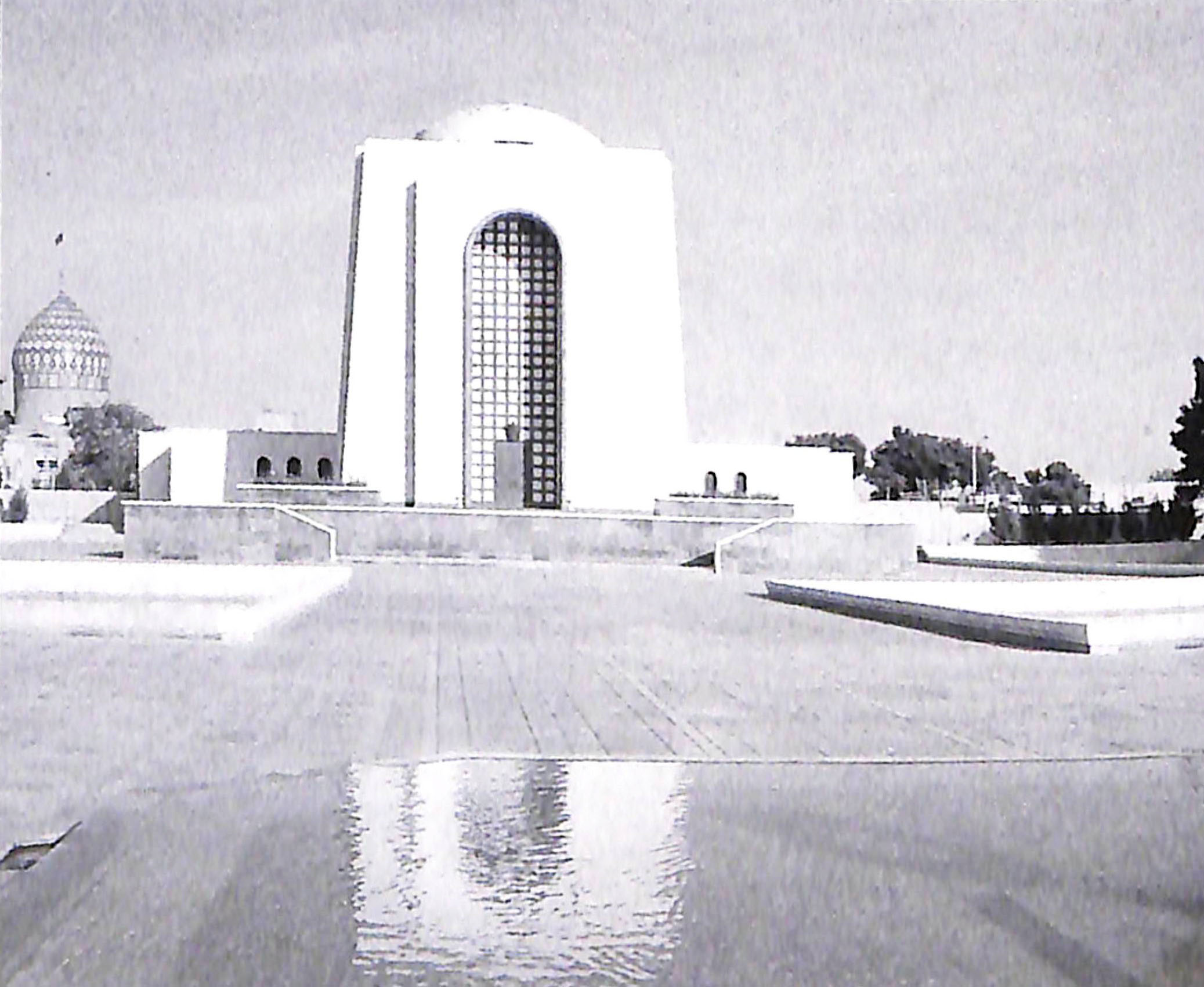 Mausolée de Reza Chah à Rey